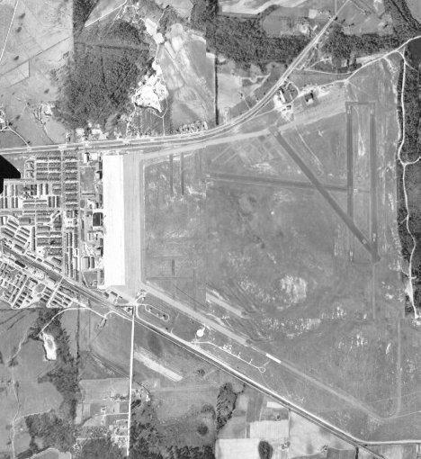 Gunter AFB, Alabama